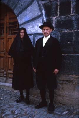 Antonia Anaut eta Ubaldo Uhalde, Izaba udalerriko azken erronkarieraren hiztun euskaldunak. Erronkari, Nafarroa. Euskal Herria. Antonia Anaut and Ubaldo Uhalde, basque language´s last roncalese dialect speakers from Isaba village. Roncal Valley, Navarre. Basque Country.